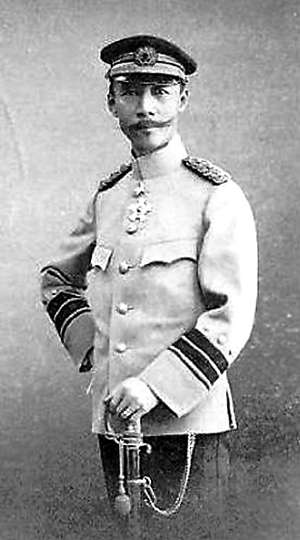 廕昌（1859年－1928年）